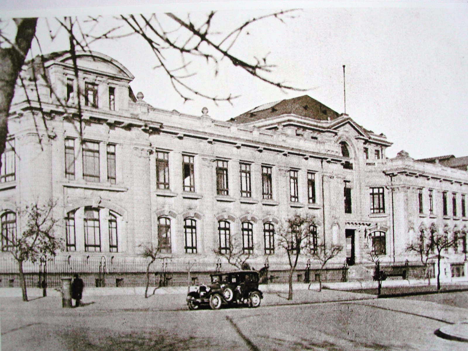 Campus Beauchef Facultad de Ciencias Físicas y Matemáticas, Universidad de Chile.